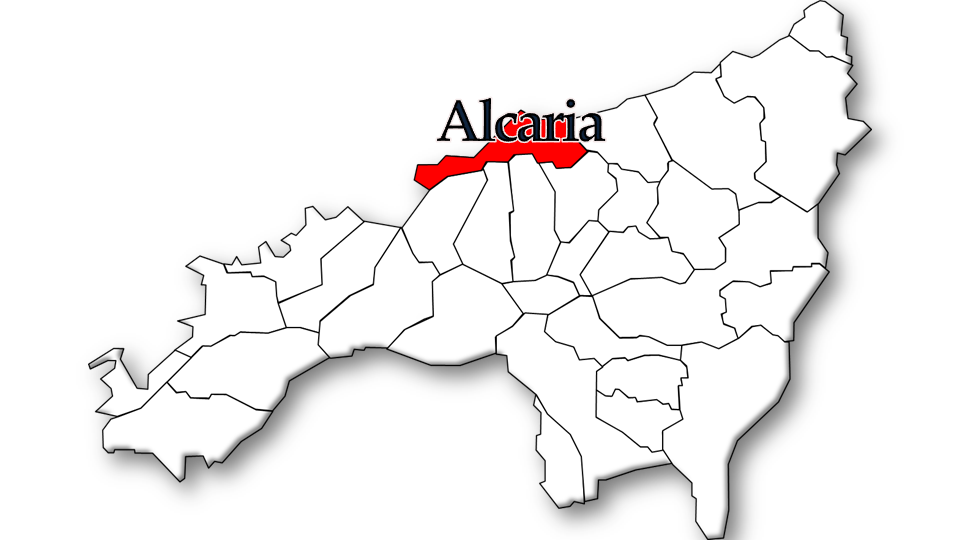 População